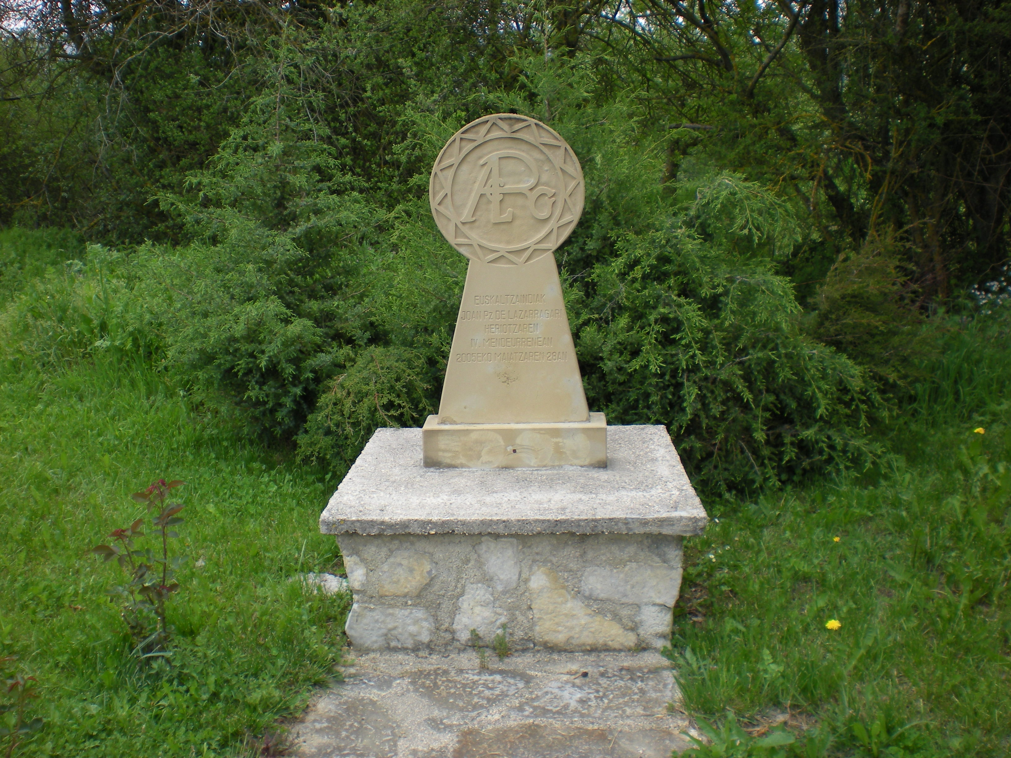 Joan Perez Lazarragaren omenez Euskaltzaindiak ezarritako oroitarria, Lazarraga dorreko bidean. Larrea herrian dago (Barrundia, Araba).